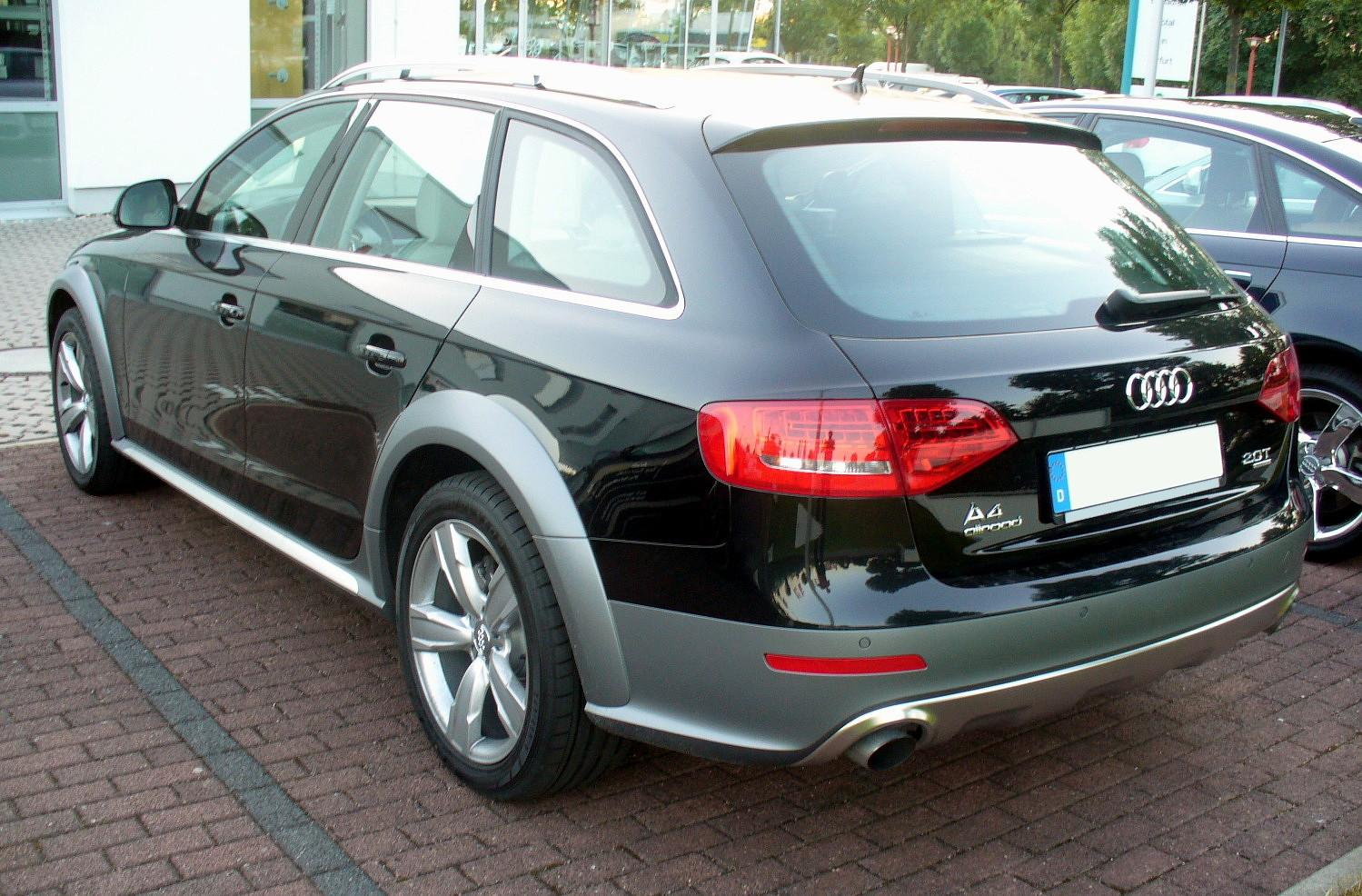 Audi A4 allroad quattro